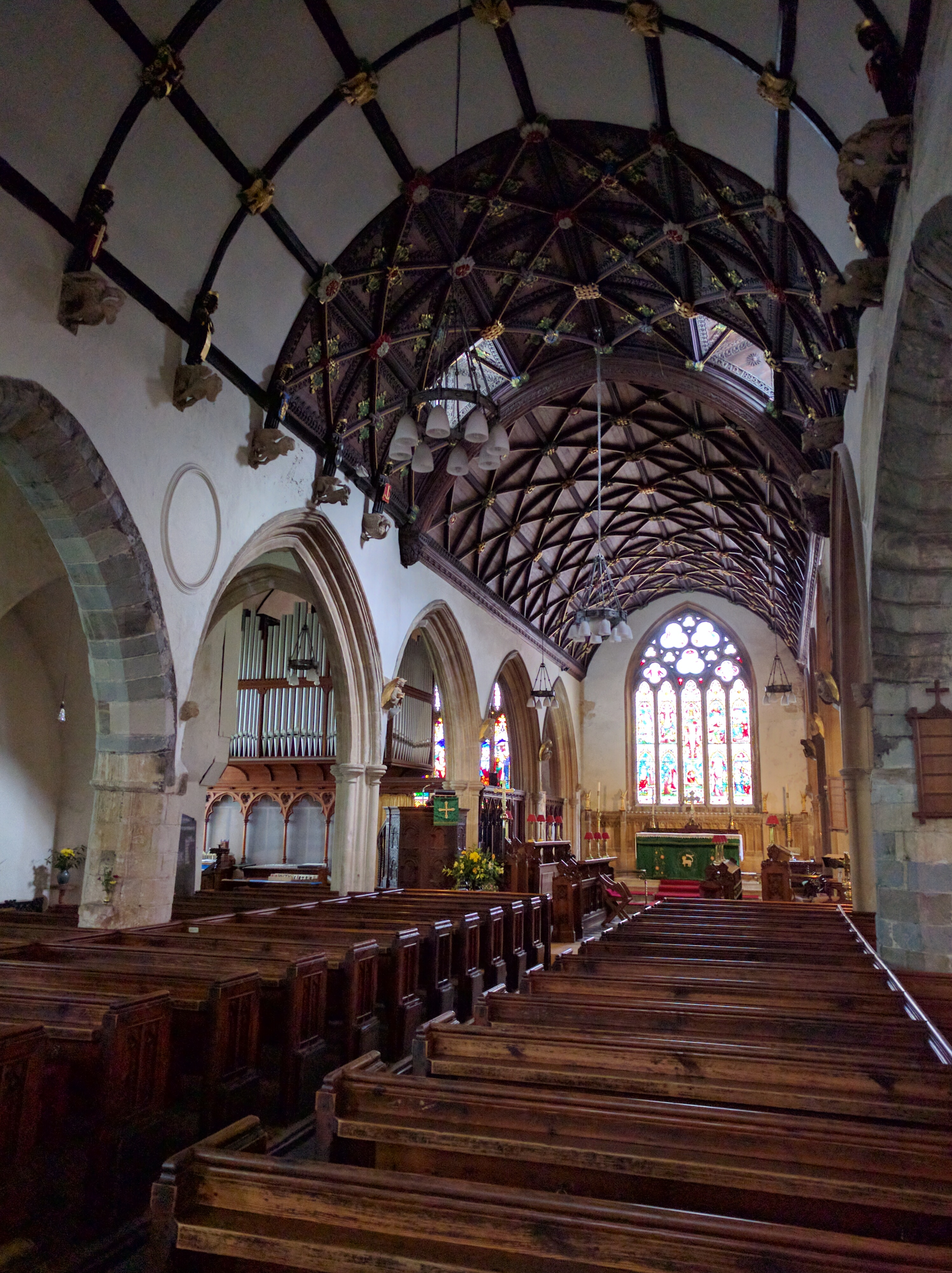 Interior Holy Trinity. Ilfracombe